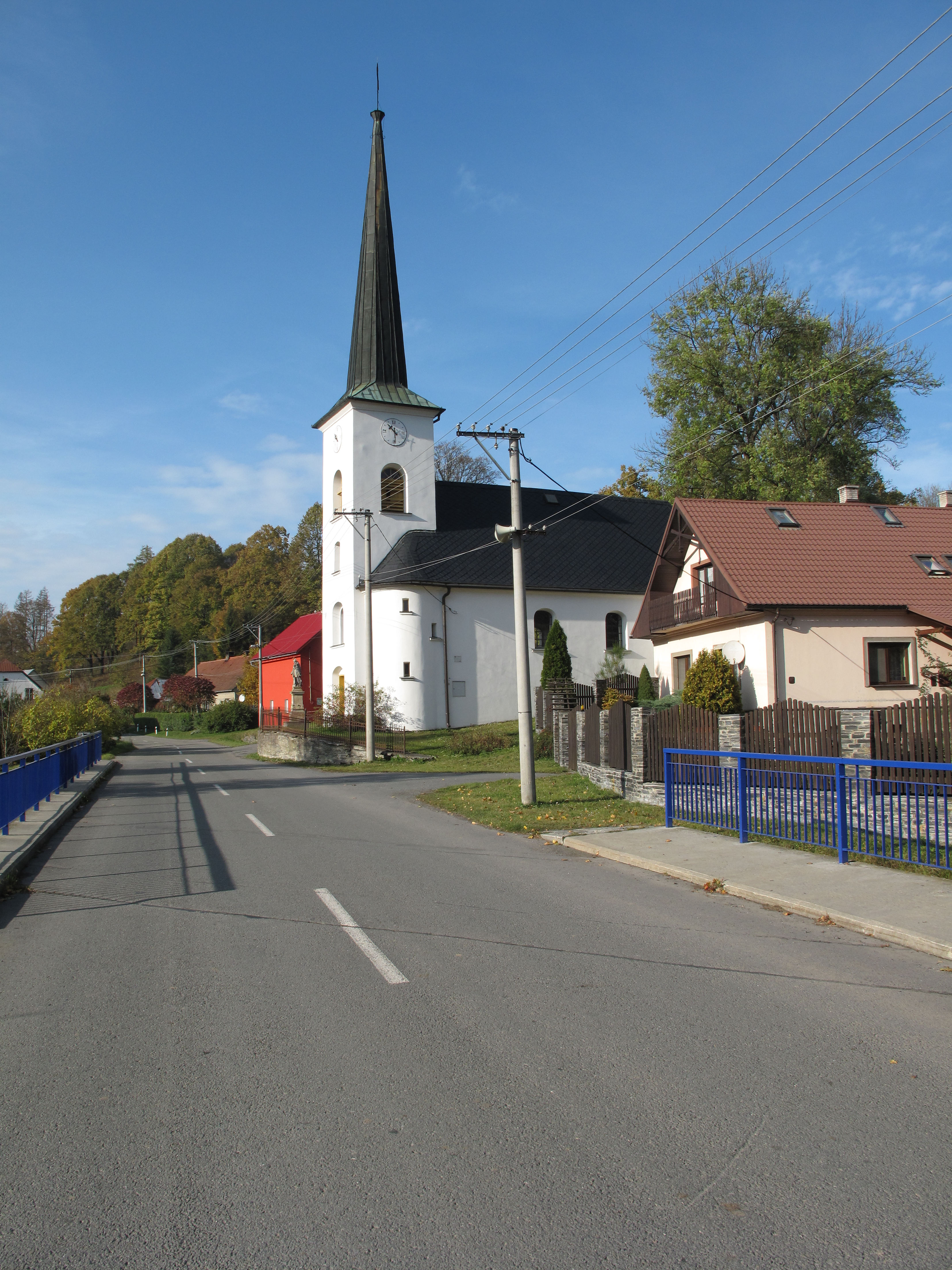 Norberčany. Okres Olomouc, Česká republika.